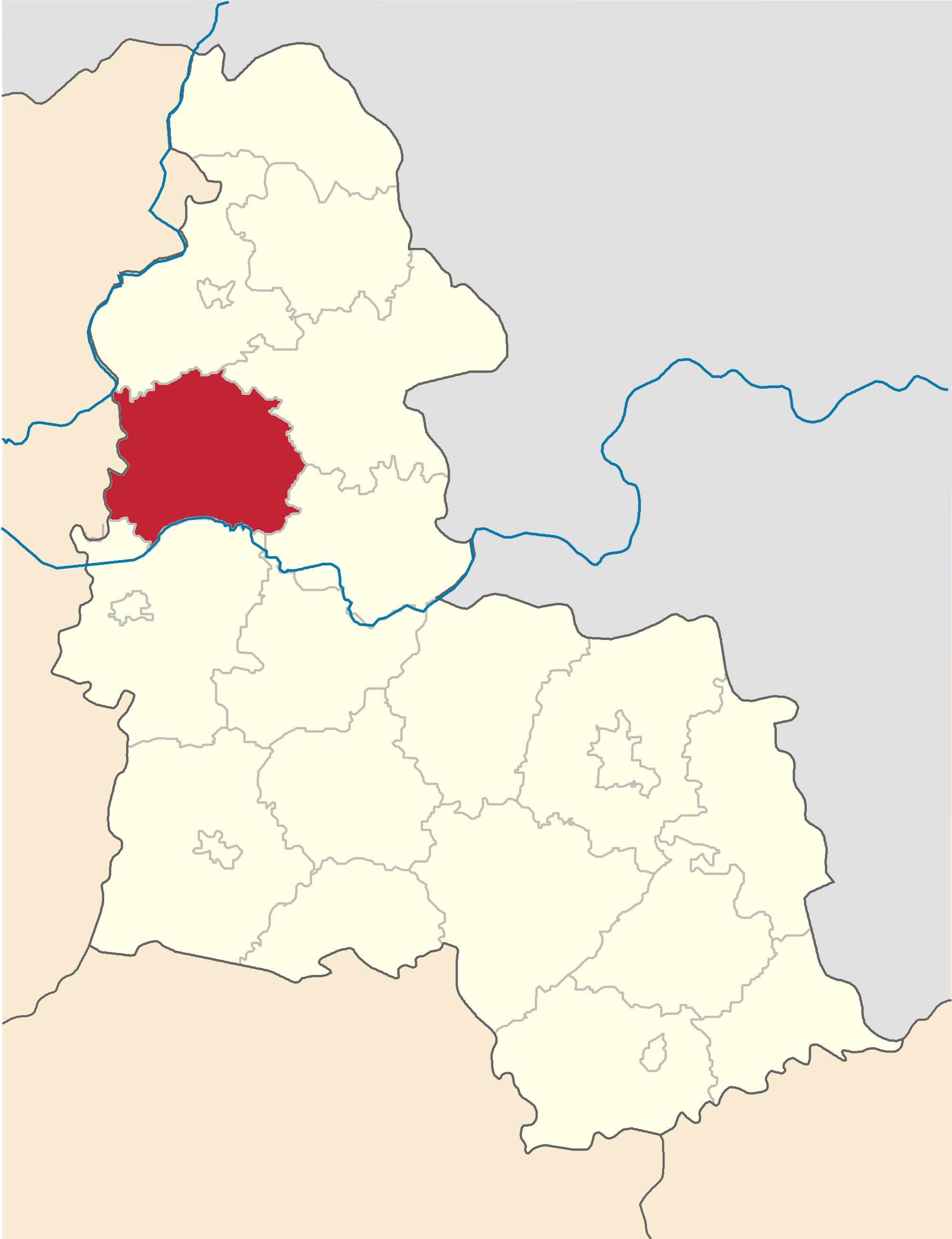 Krolevetskyi-Raion map